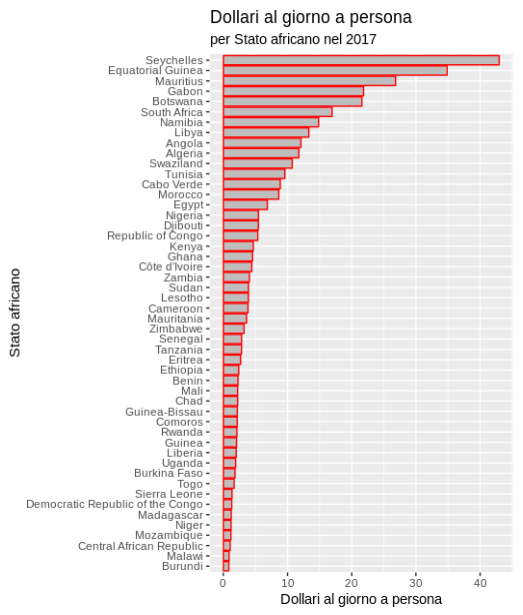 file realizzato con RStudio con dati dal IMF